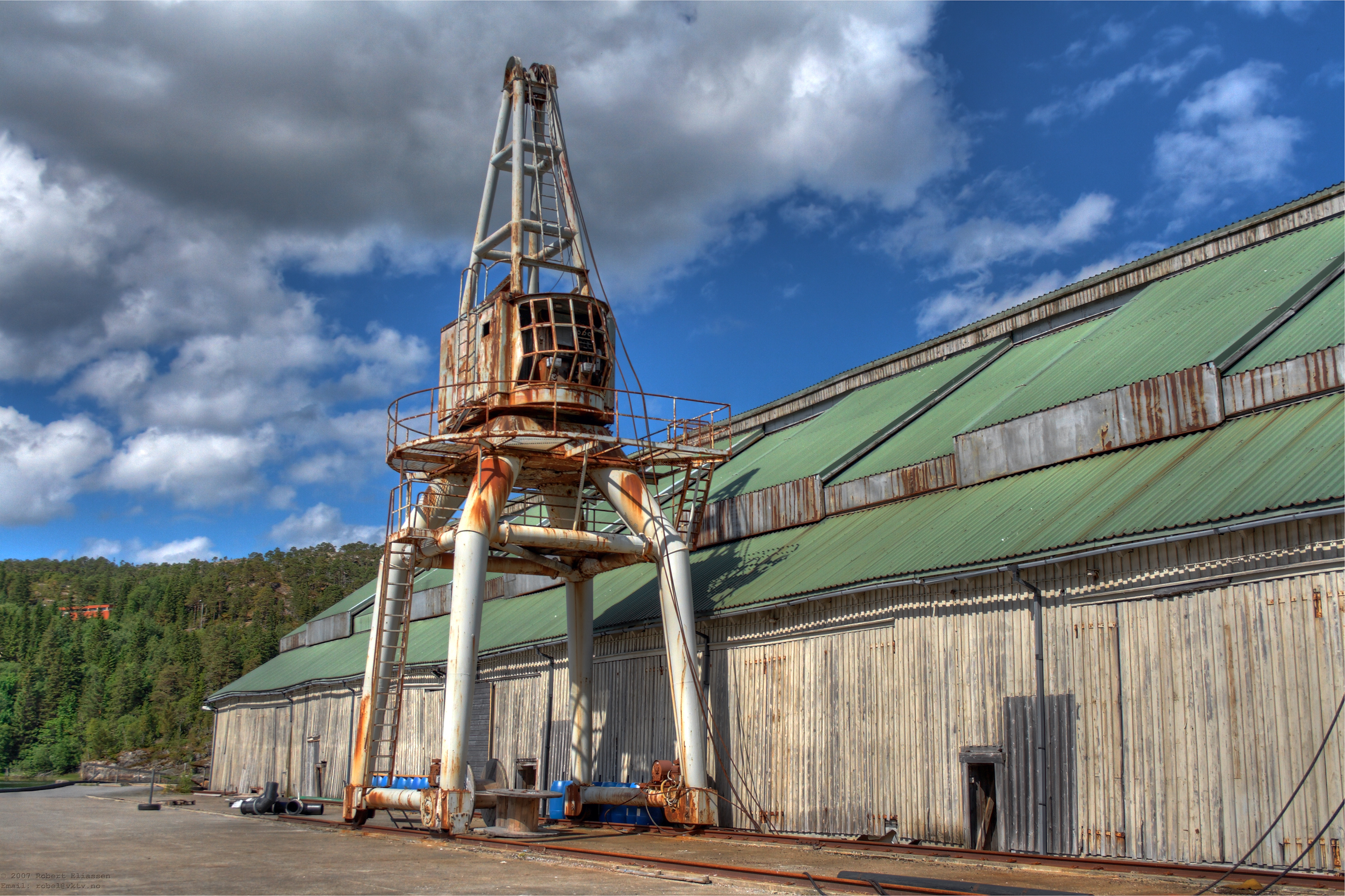 Salsbruket quay